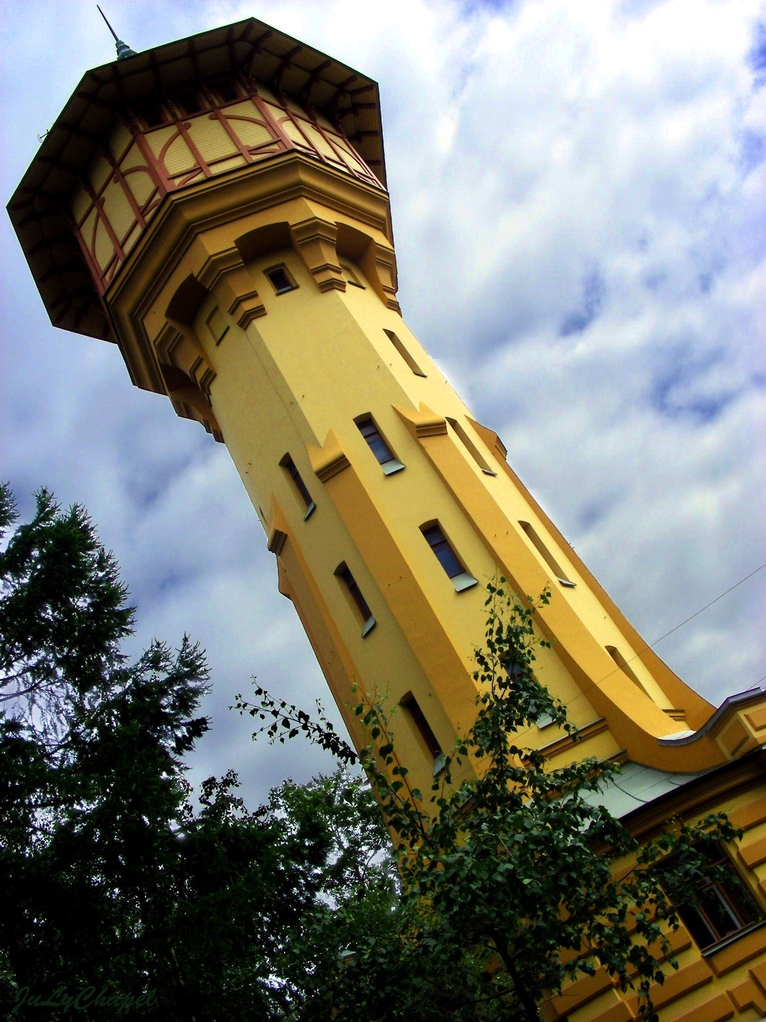 Построена в 1905 году. Первоначально предназначалась для водоснабжения Политехнического института, в последующем использовалась учеными-гидравликами института для научных исследований. В настоящее время в здании располагаются кафедры "Гидравлика" (инженерно-строительный факультет) и "Гидромашиностроение" (энергомашиностроительный факультет) - инф. сайта СПбГПУ